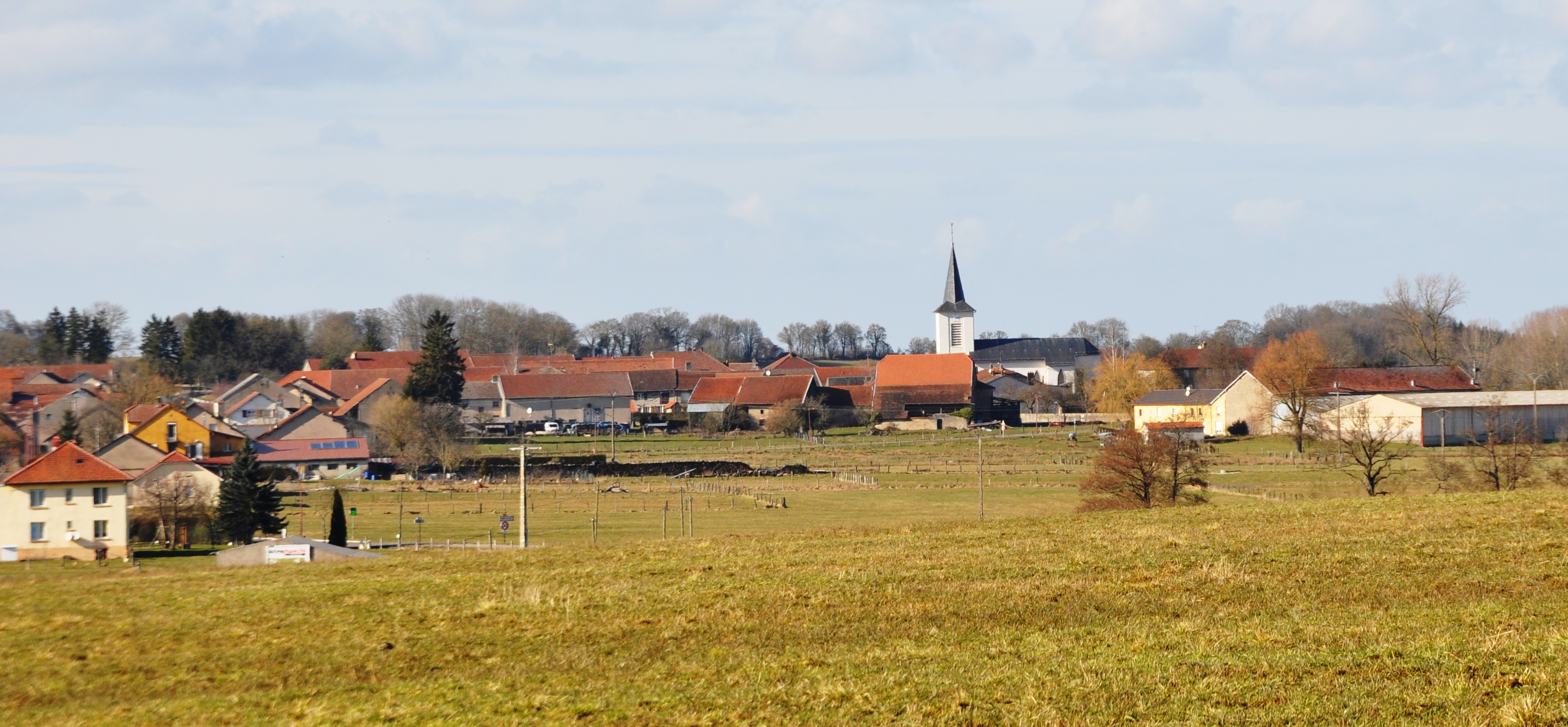 Vue sur le village